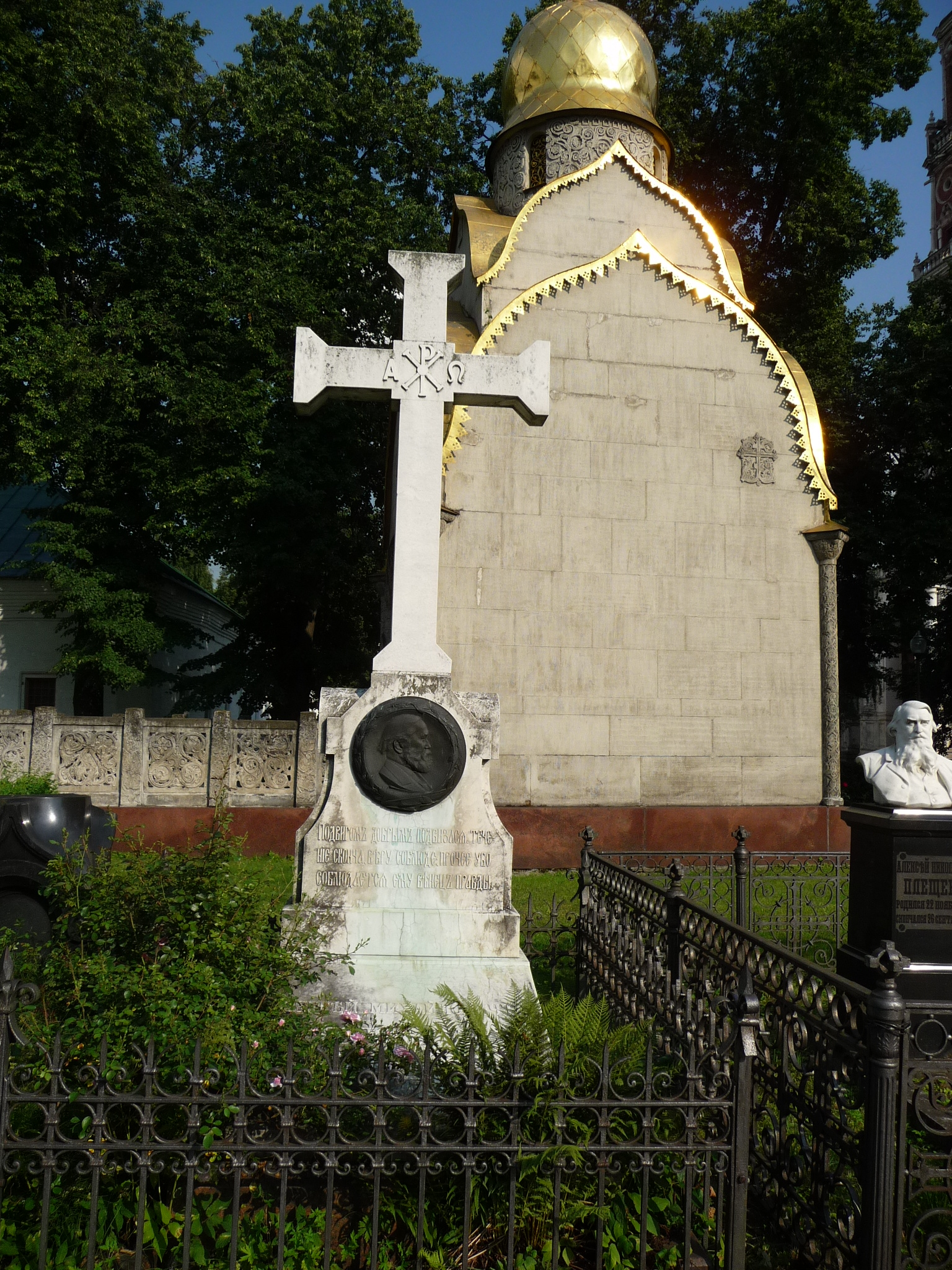 Novodievivhi-Tumb-p1030362.jpg